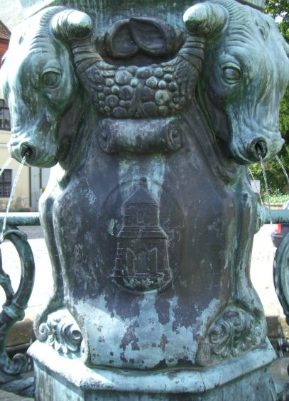 Burgturm der Burg Dohna am 1912 eingeweihten Fleischerbrunnen am Markt in Dohna. Den Fleischerbrunnen schuf der Dresdner Bildhauer Alexander Höfer.